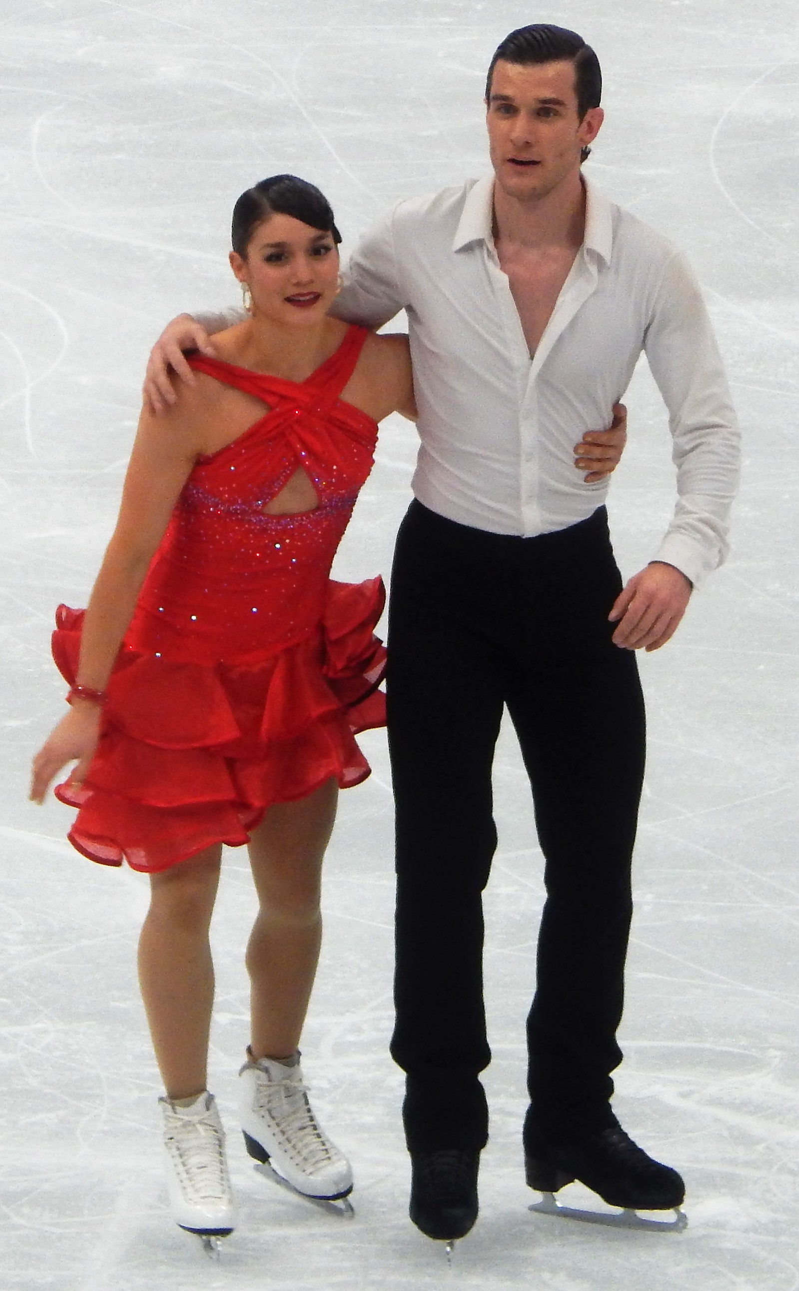 Чемпионат Европы по фигурному катанию 2018 в Москве. Третий день соревнований (19 января). Танцевальная пара из Дании Лоранс Фурнье Бёдри и Николай Соренсен